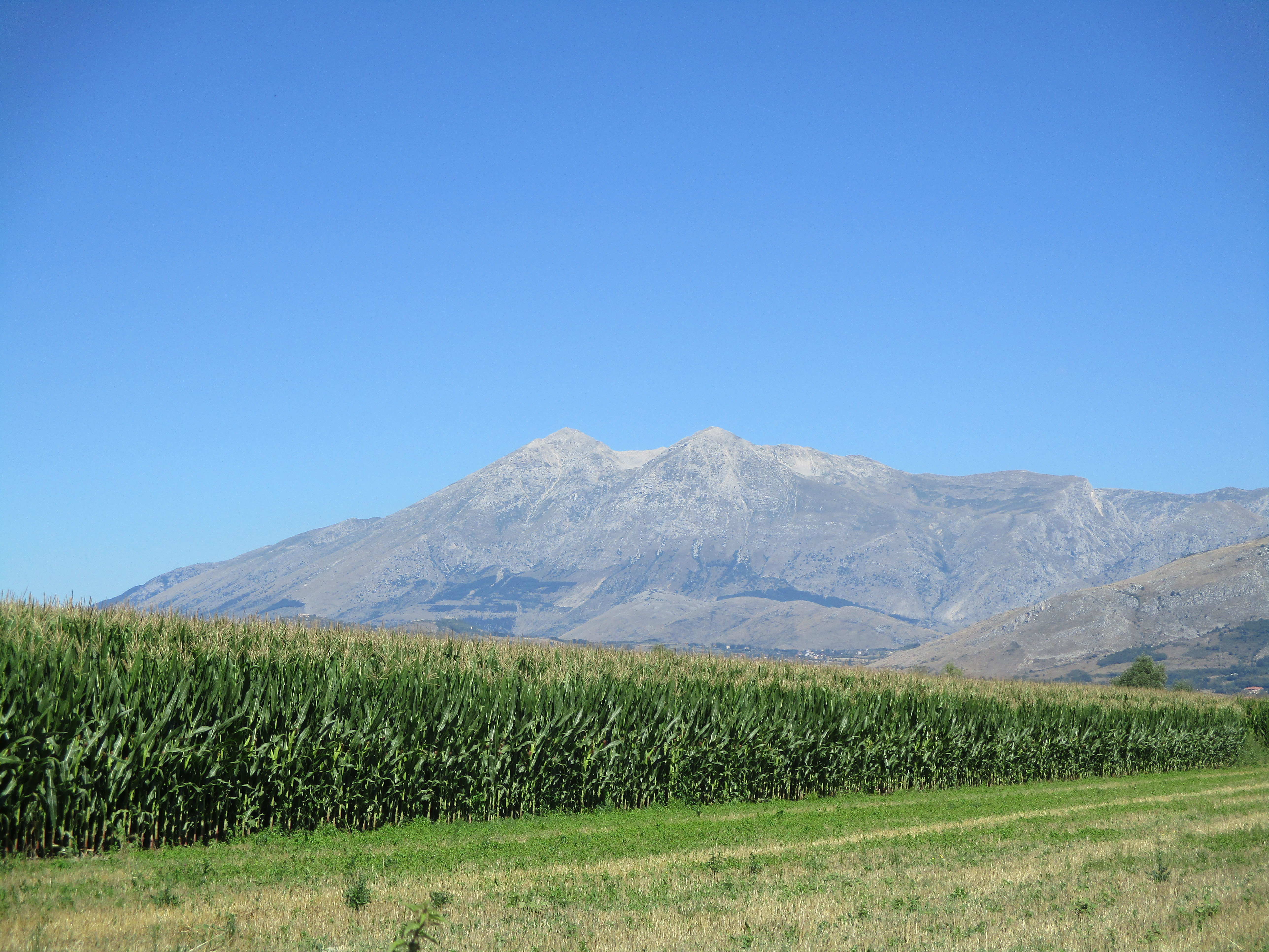 Fucino (sullo sfondo il monte Velino)